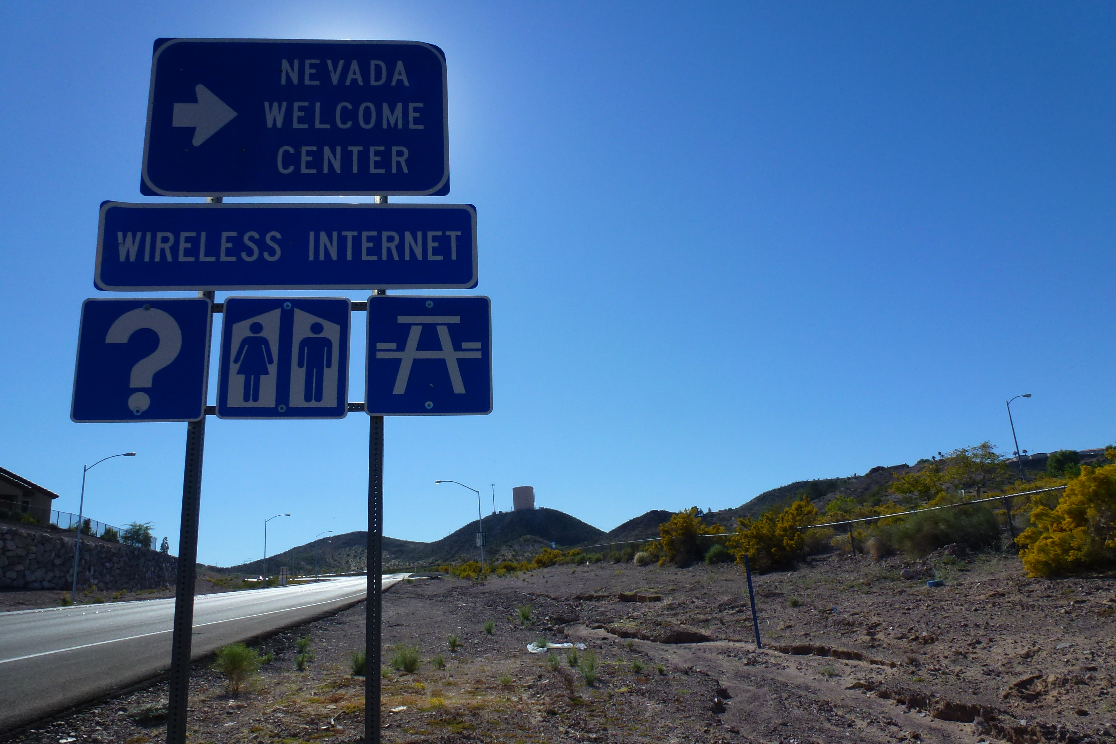 Nevada Welcome Center, 2012